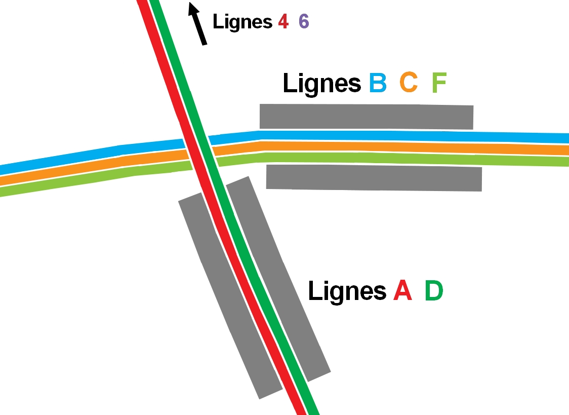 Plan schématique de la disposition des quais de la station Homme de Fer